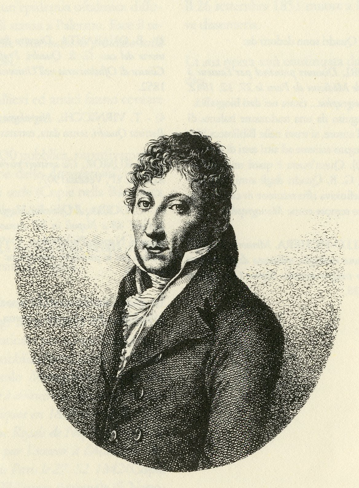 Ritratto di Giovanni Battista Quadri fatto pubblicare dai suoi allievi a Bologna nel 1812